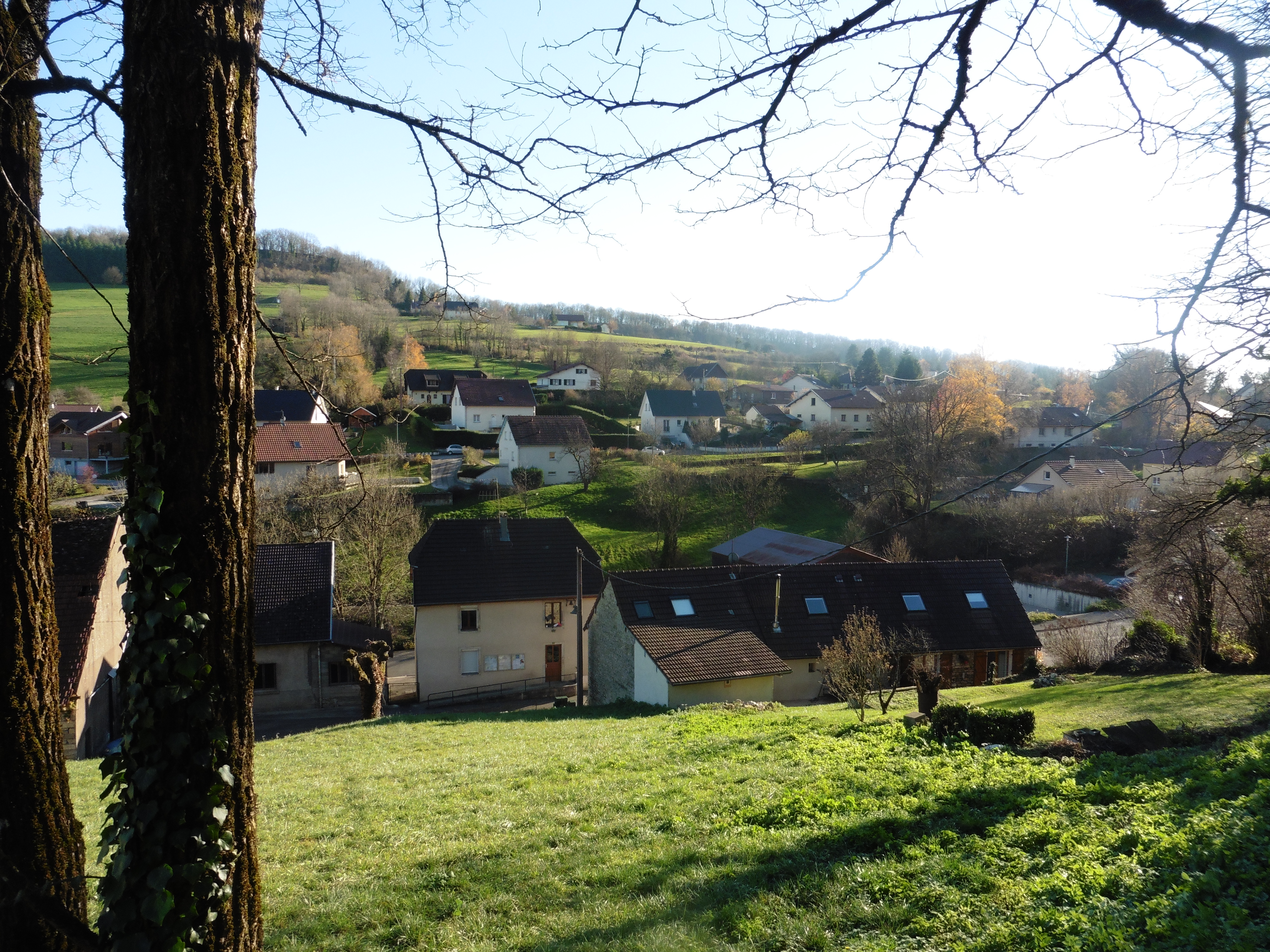 Vue sur le sud du village